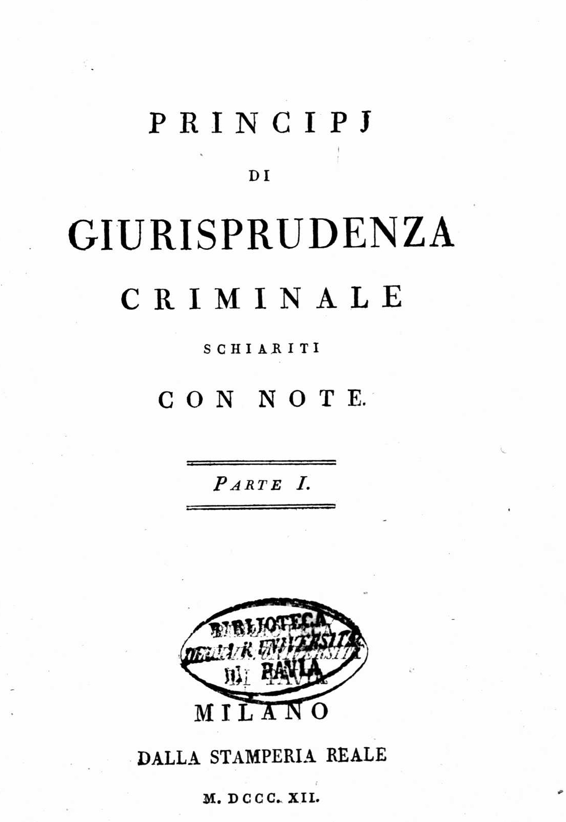 Frontespizio